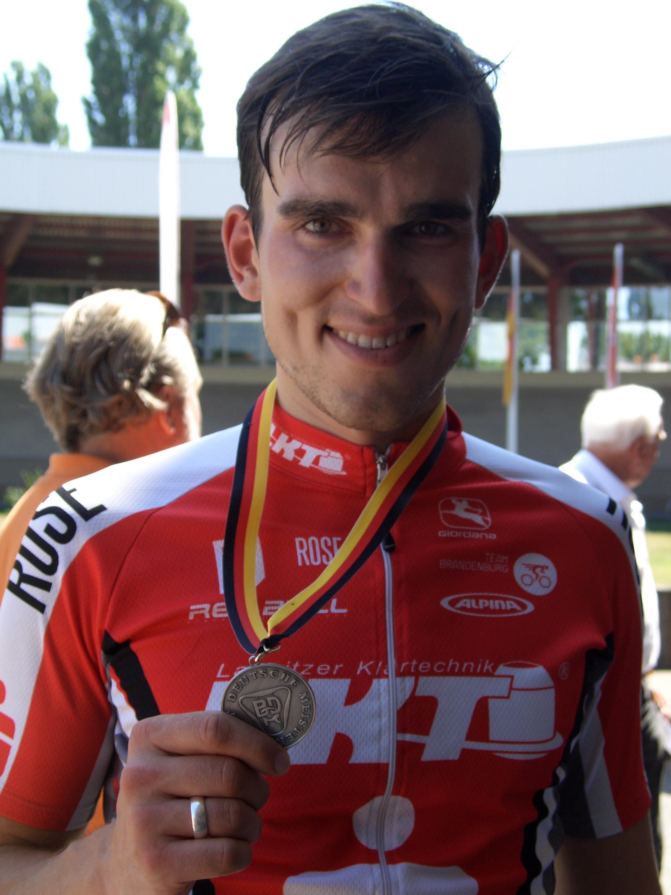 Henning Bommel, Radrennfahrer, Bahn Dm Cottbus 2010